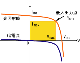 太陽電池の電圧－電流特性の模式図 最大出力点(Pmax)は出力電力（黄色の領域の面積に対応）が最大になる点。